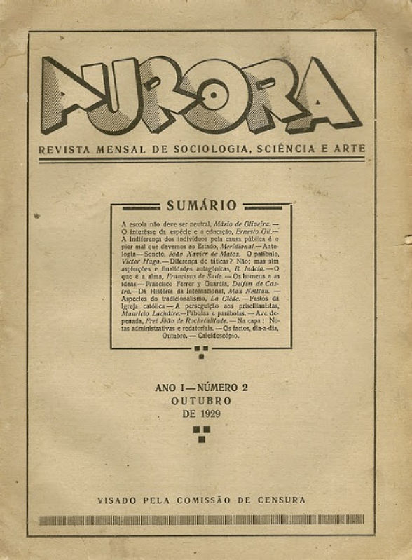 Aurora, Revue mensuelle anarchiste de sociologie, science et art publie quatorze numéros entre septembre 1929 et octobre 1930, sous la dictature militaire au Portugal.